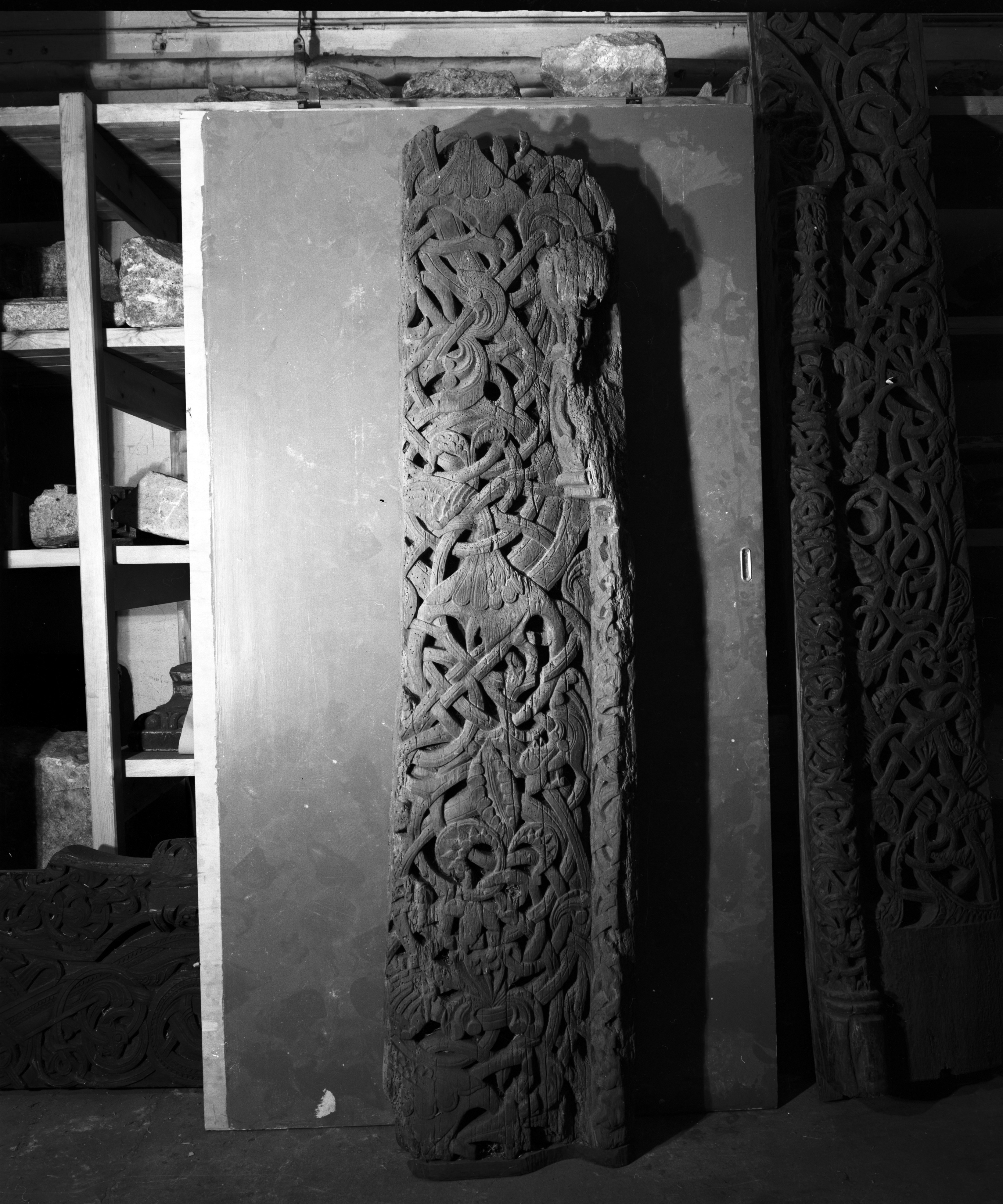 Portalplanke fra Vangsnes stavkirke, nå i Bergens musem (Kulturhistoriske samlinger, Universitetsmuseet i Bergen). Bilde fra Unimus, jf. søk (s. 4).